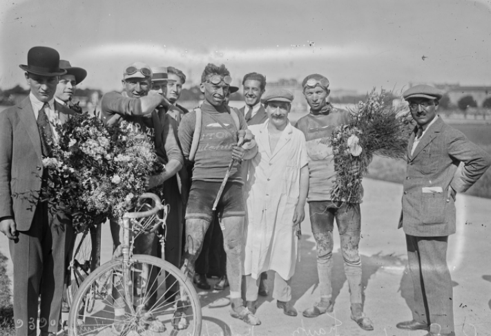 Parc des Princes [vélodrome], 20/7/24, arrivée du Tour de France, [les coureurs cyclistes] Omer Huyse, Bottecchia, Frantz [de d. à g.]